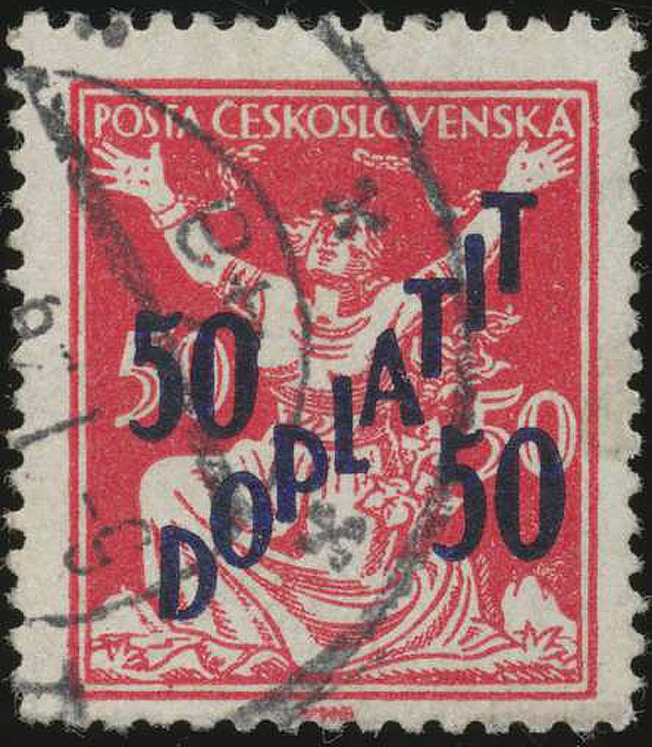 Доплатная марка Чехословакии; надпечатка на почтовой марке из серии "освобождённая республика"